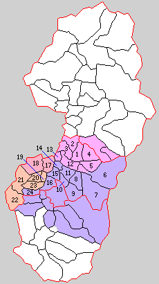 山形県東村山郡の町村。